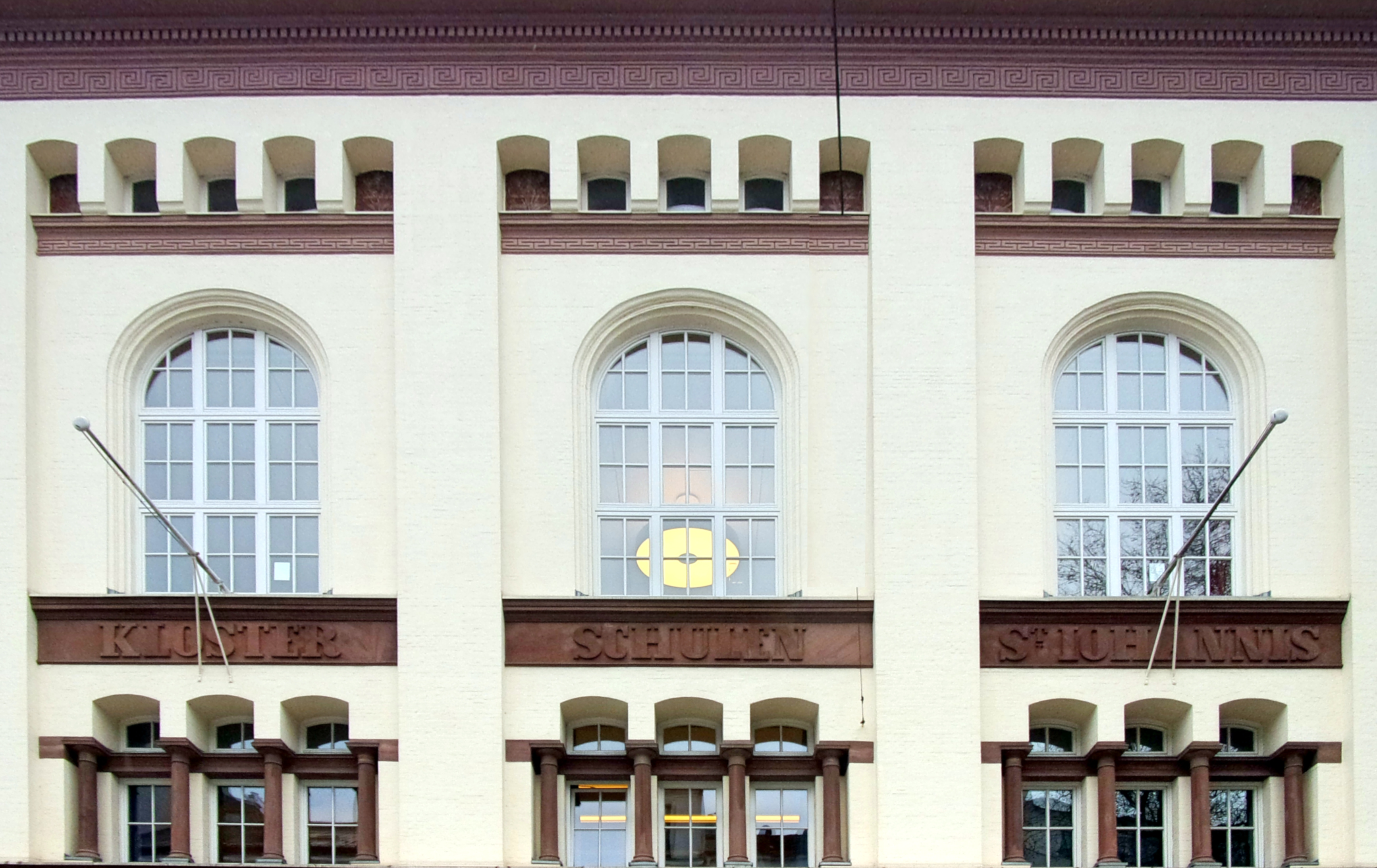 Berufliche Schule An der Alster, ehemalige Mädchen- und Klosterschule St. Johannis. Erbaut zwischen 1873-1874, erweitert zur Rautenbergstraße 1884, Ausführung Hermann Dietrich Hastedt. Im Foto eine Ansicht am Haupteingang Holzdamm 5. This is a photograph of an architectural monument.